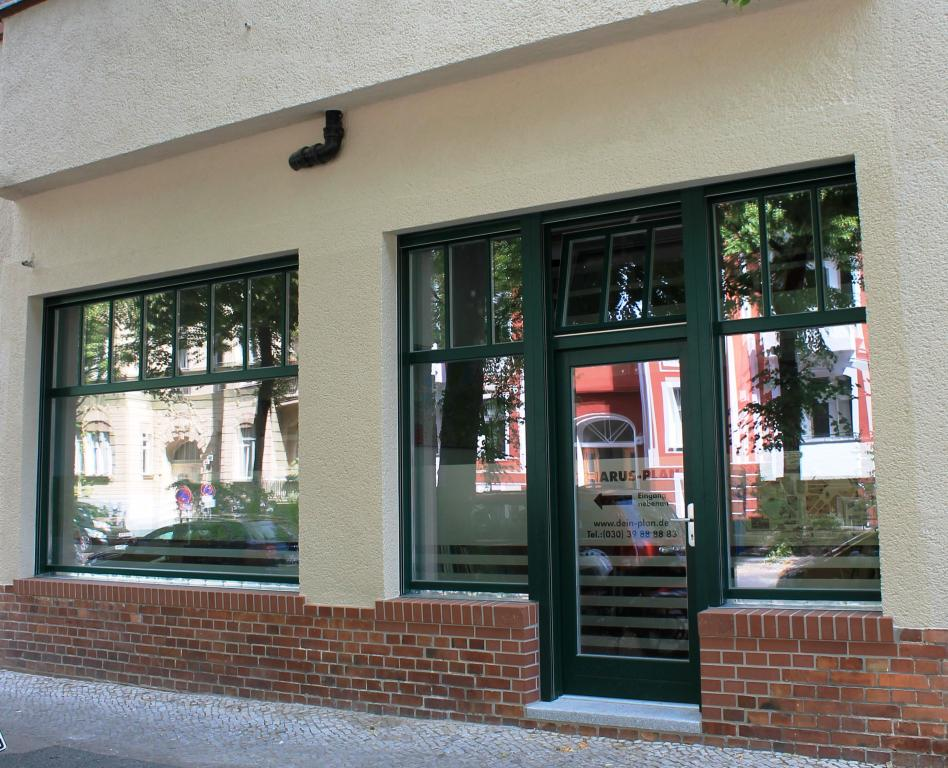 Blick auf den neuen Standort von Pharus Plan